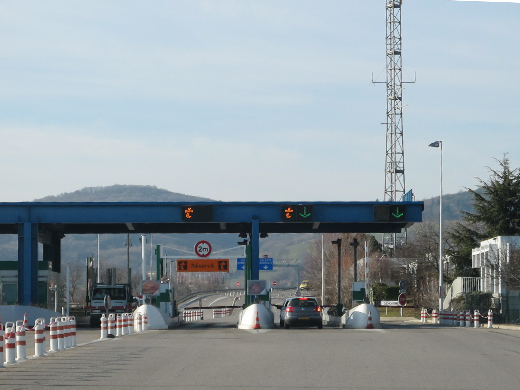 Barrière de péage de Rives / Autoroure A48, Isére France